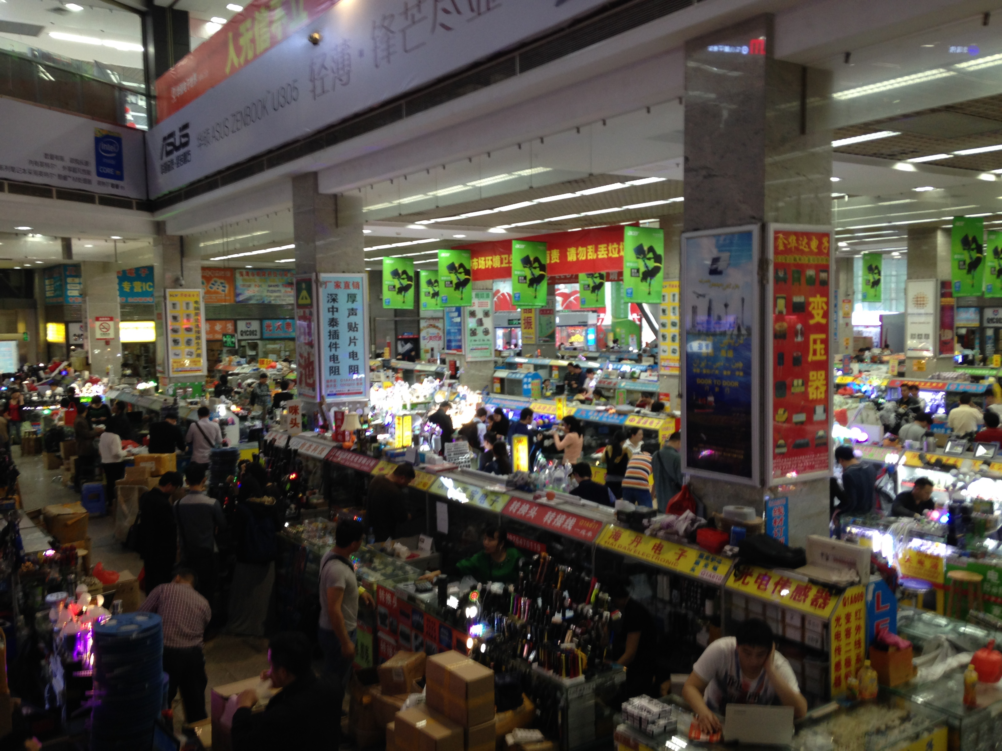 深圳華強電子世界